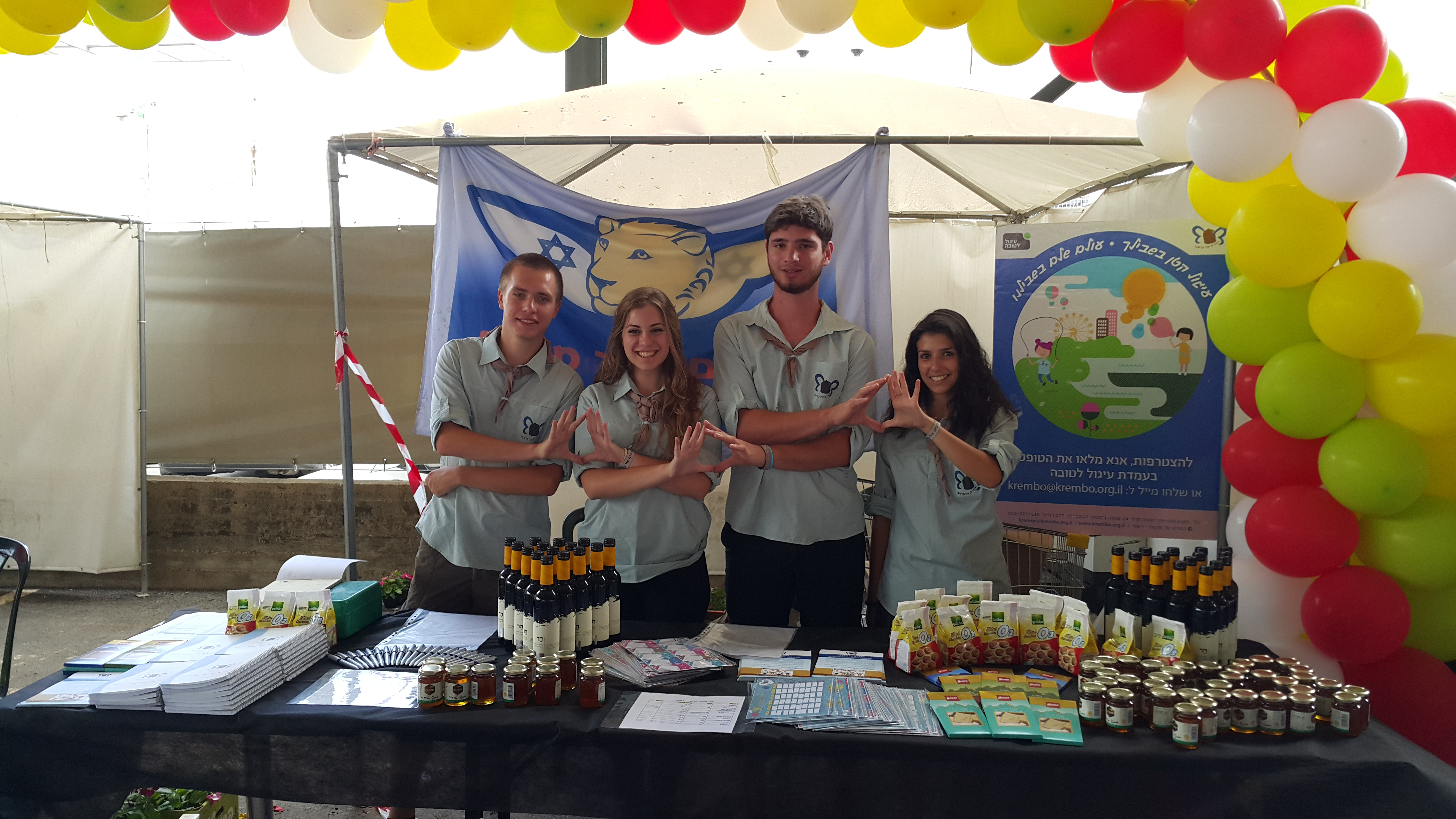 "עמדה של עמותת "כנפיים של קרמבו